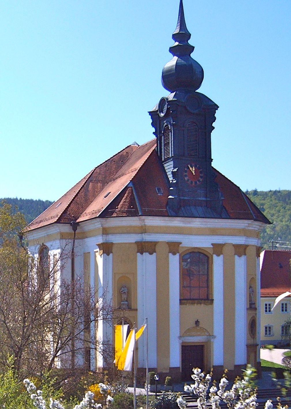 Wallfahrtskirche „Unserer lieben Frau vom Roggenacker“, Flochberg, Bopfingen